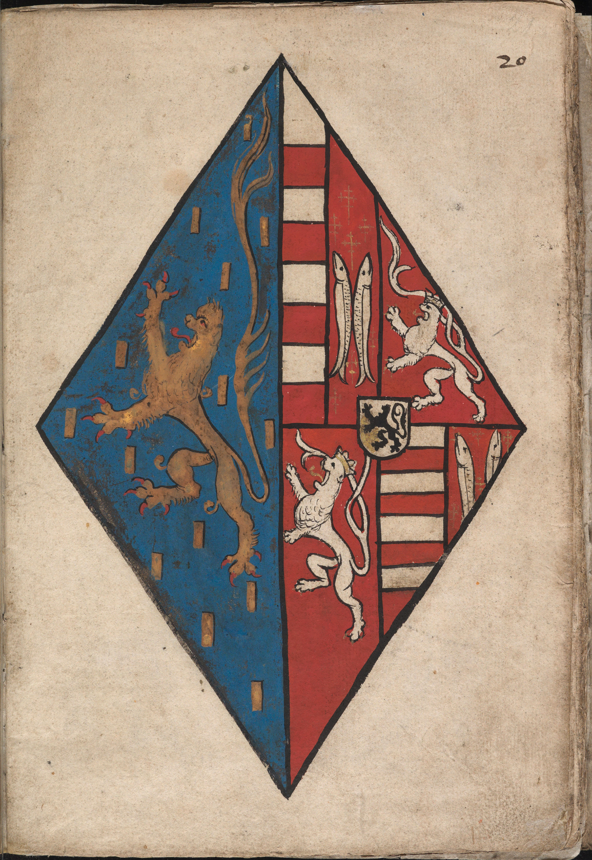 Wapenschilden van vrouwen zijn in de middeleeuwen meestal ruitvormig. Hier zijn de wapens van Nassau gecombineerd met die van Loon-Heinsberg. Het is het wapen van de moeder van Engebrecht II van Nassau, Maria van Loon-Heinsberg (1426-1502). Zij trouwde in 1440 met Johan IV van Nassau (1410-1475).